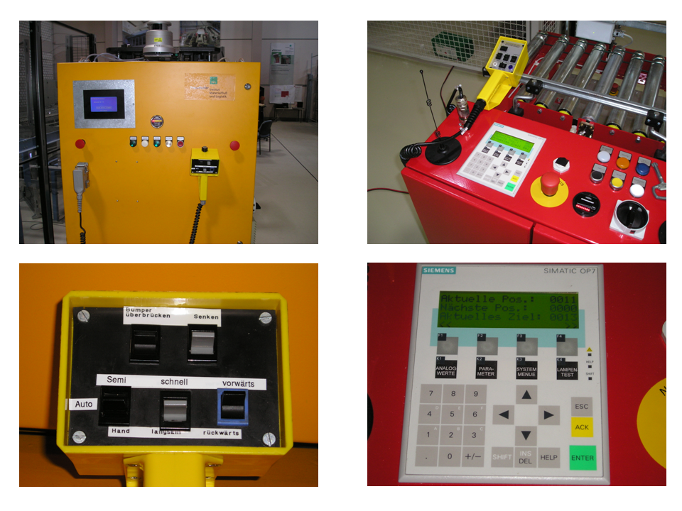 Bedienelemente eines FTF: Handsteuerung und Display